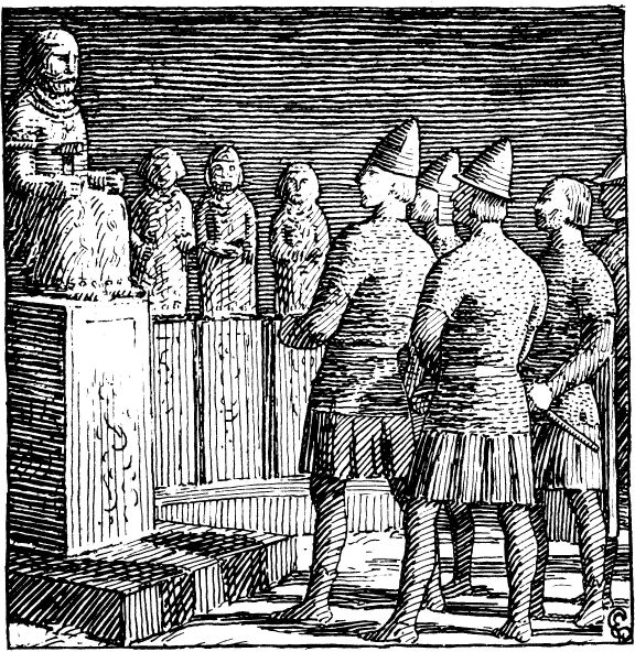 Halfdan Egedius: Illustration for Olav Trygvasons saga. Snorre 1899-edition. «Kong Olav inde i Tors Hov.» nb: «Kong Olav inne i Tors hov.» nn: «Kong Olav inne i Tors hov.»